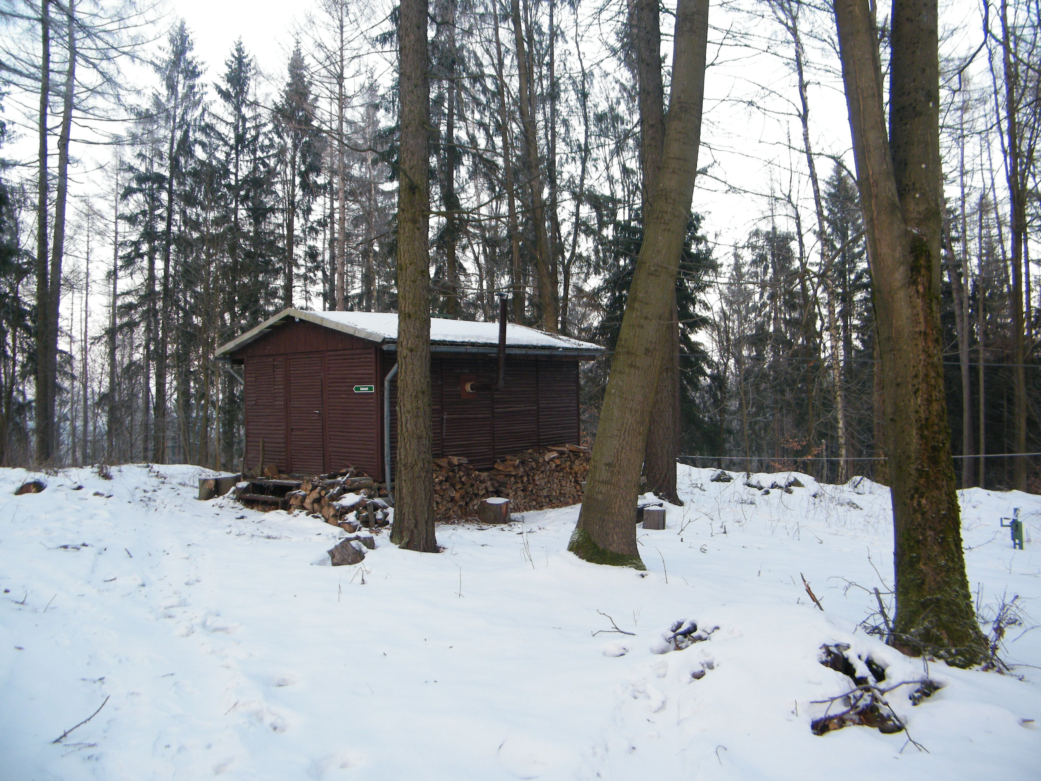 Vrchol Kaiserbergu u Sebnitz, Šluknovská pahorkatina